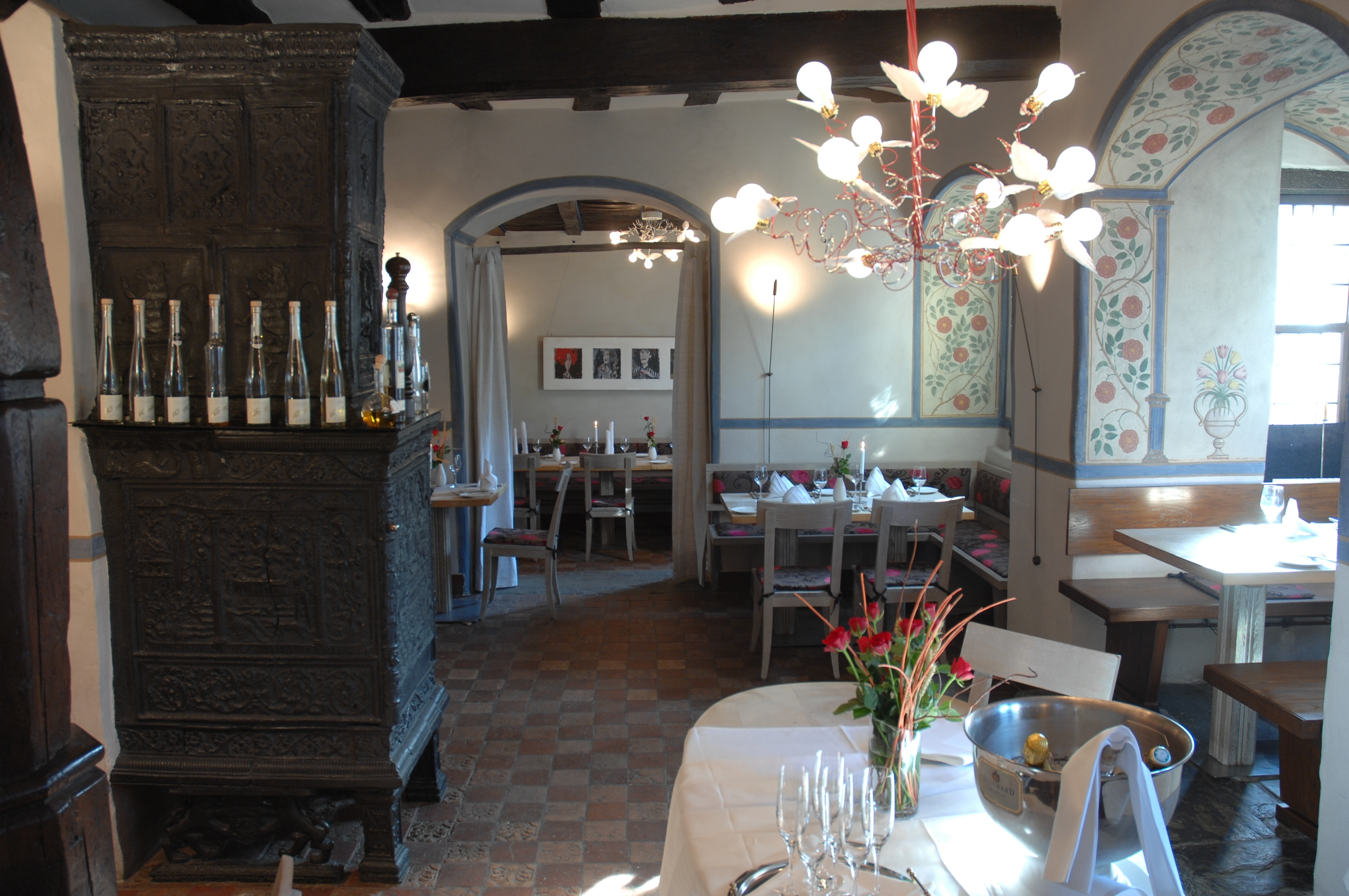 Innenansicht des Restaurantbereichs im Höerhof